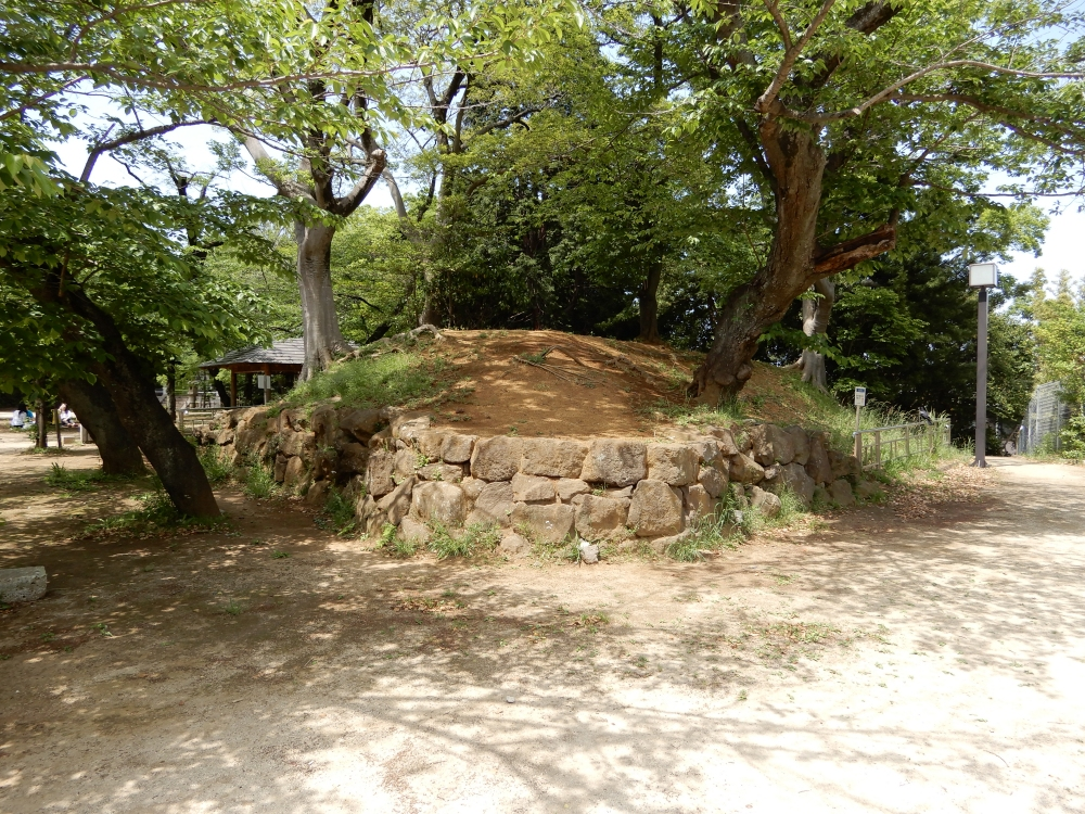 亥鼻城土塁